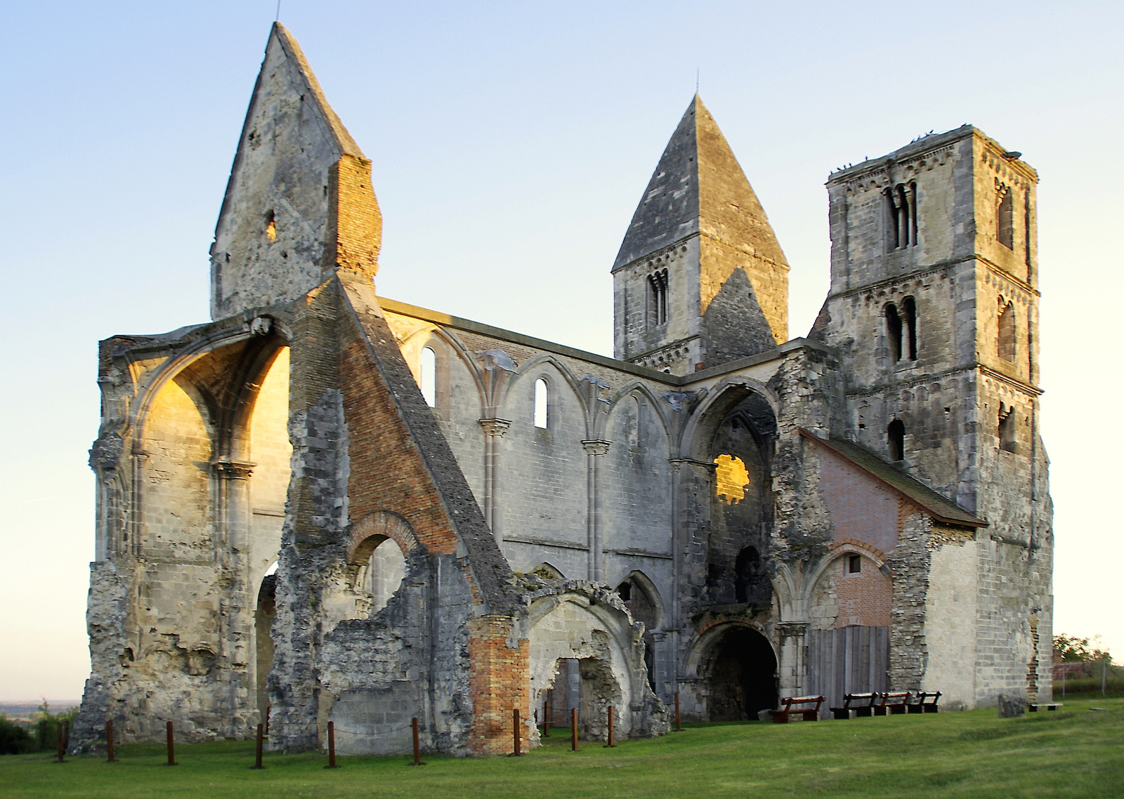 Premontrei prépostsági templom romja (Zsámbék, Régi templom u.) This is a photo of a monument in Hungary. Identifier: 7623